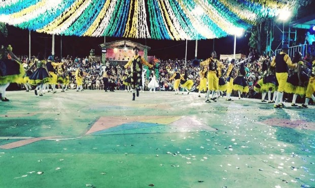 Festas Juninas